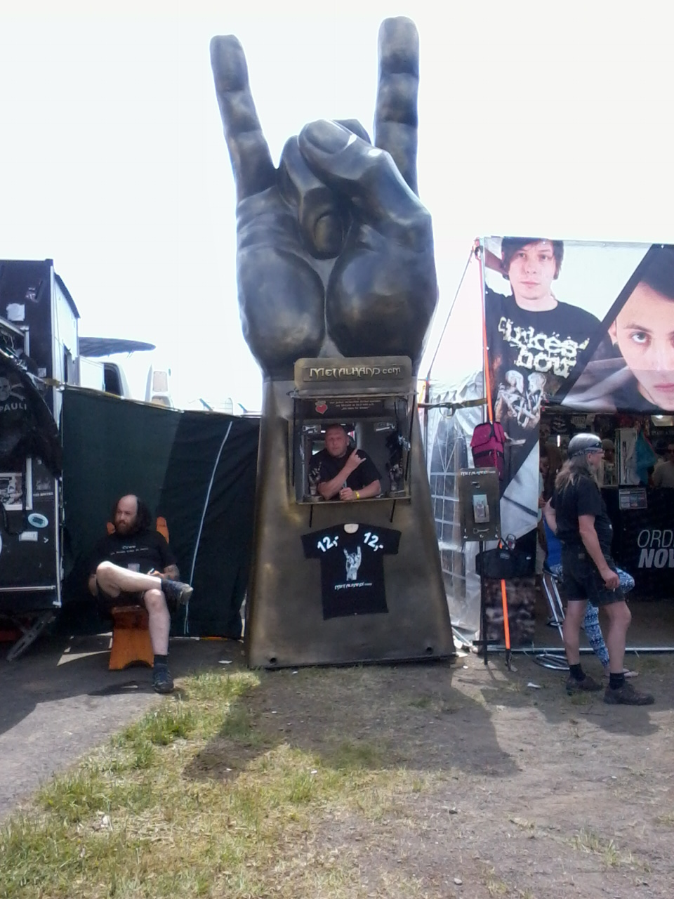 Die mano cornuta oderr auch Pommesgabel als Verkaufsstand. Gesehen auf dem Rock am Ring Open Air 2013